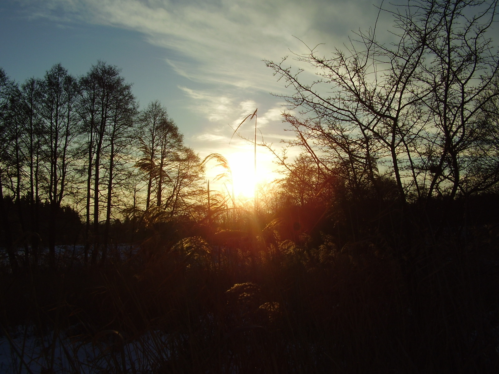 Vysočina